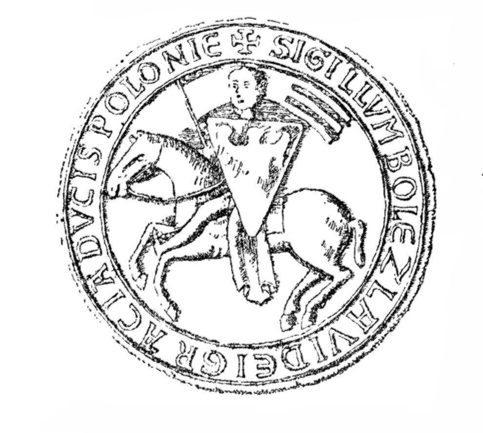 Bolesław Pobożny seal